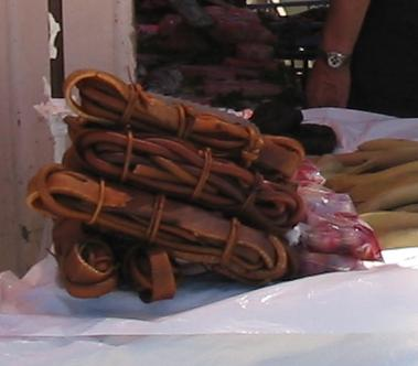 Cochayuyo (getrocknete Algen) auf einem Markt in Viña del Mar (Chile)